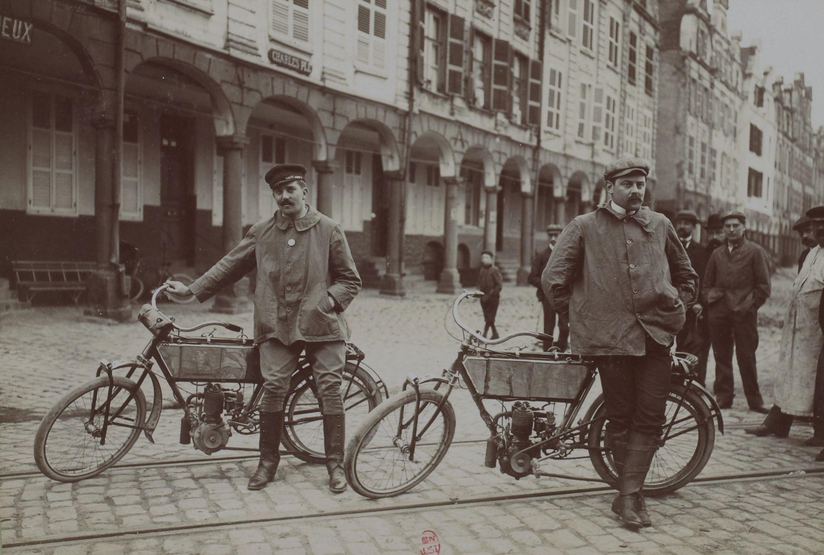 [Collection Jules Beau. Photographie sportive] : T. 26. AnnÃ©e 1904 / Jules Beau : F. 40v. [Meeting d' Arras], Circuit du Pas-de-Calais en tourisme, 28 mai 1904